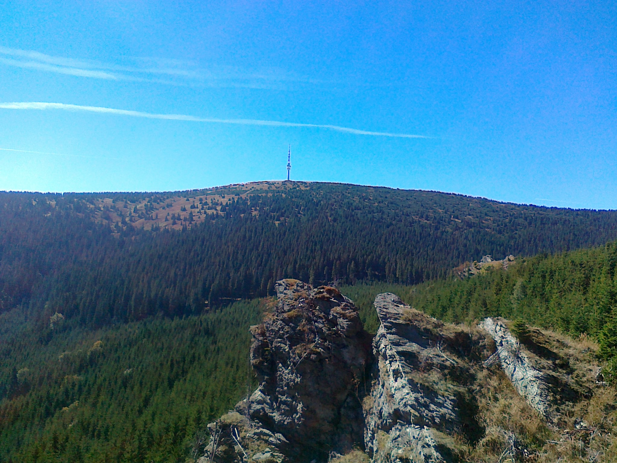 Widok ze skaliska Sokolí Skála (1) - 1163 m n.p.m. na górę Praděd - 1491 m n.p.m.